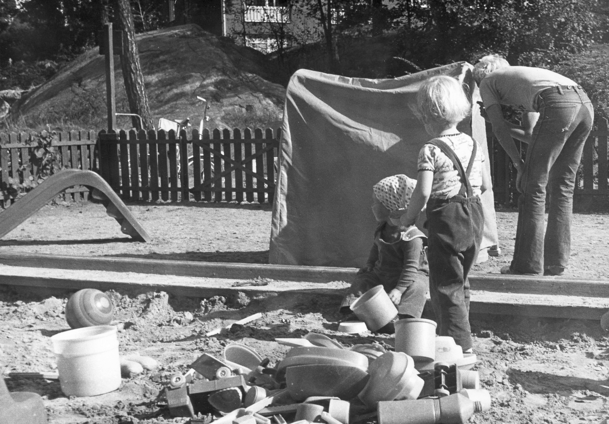 Parkleken vid Riksrådsvägen i Skarpnäck